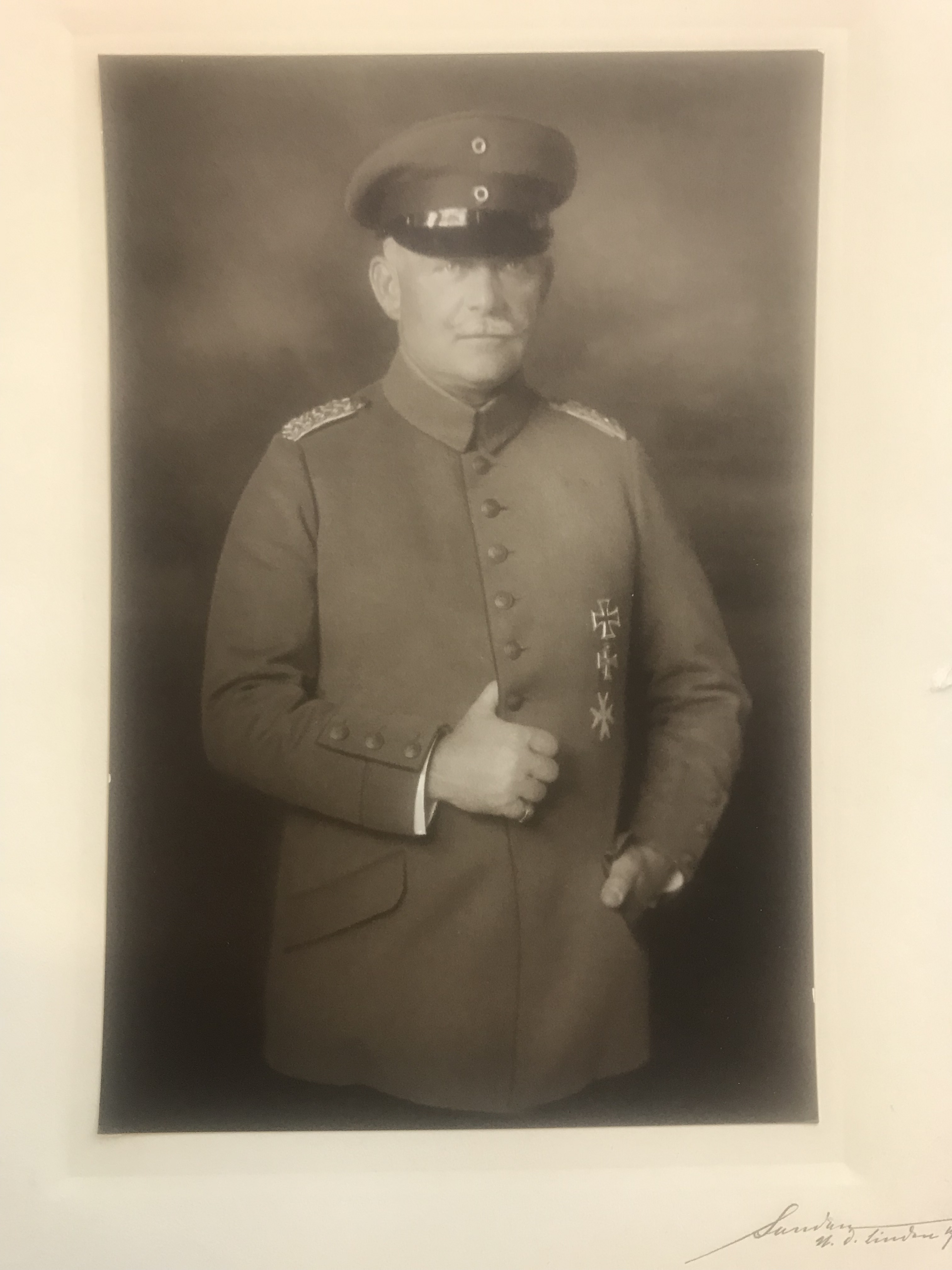 signierte Porträtfotografie Oberst Alfred von Rauch, 1917 (Ernst Sandau;senior) - aufgenommen im Berliner Atelier Unter den Linden 19